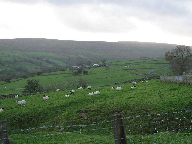 Looking Up Walden Dale